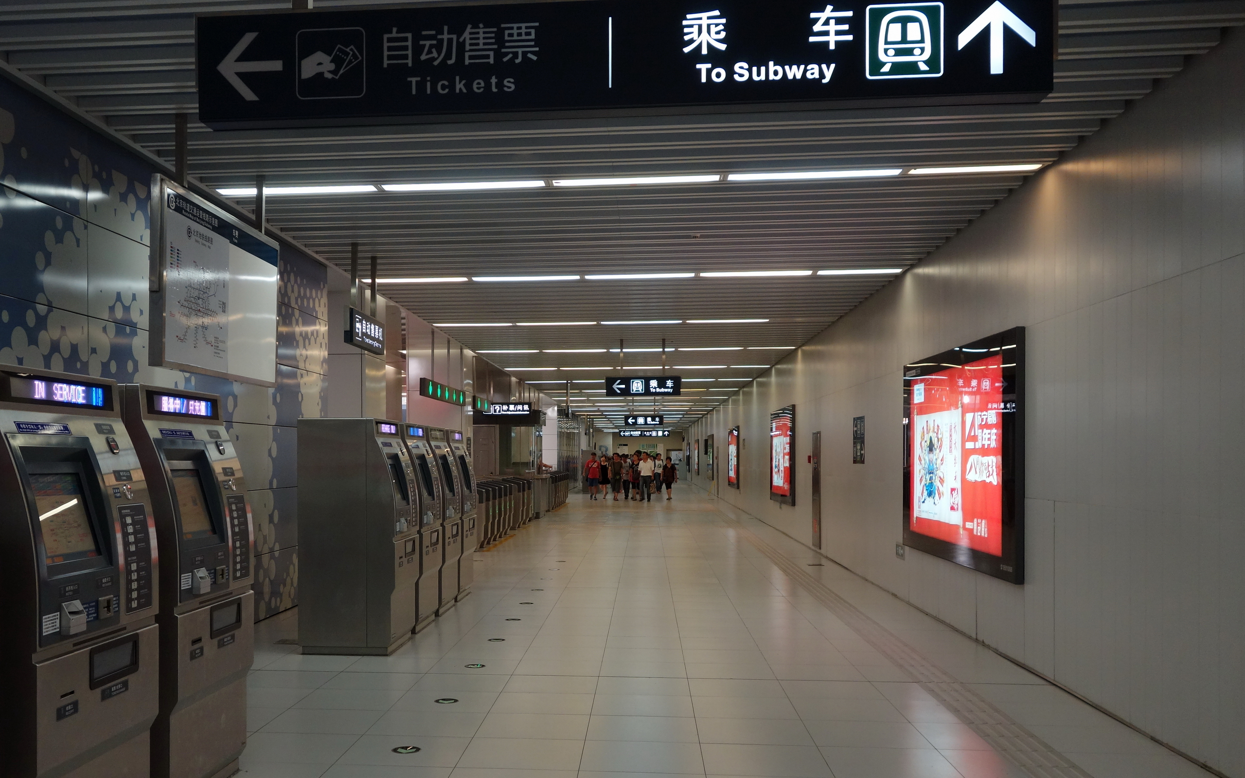 北京地铁8号线奥体中心车站站厅层